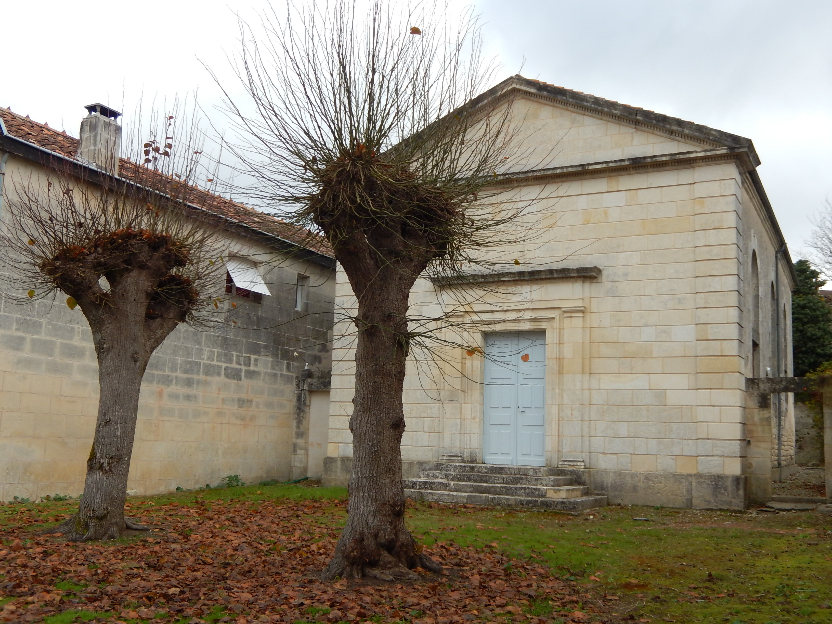 Le temple protestant, à Saint-Savinien, en Charente-Maritime.